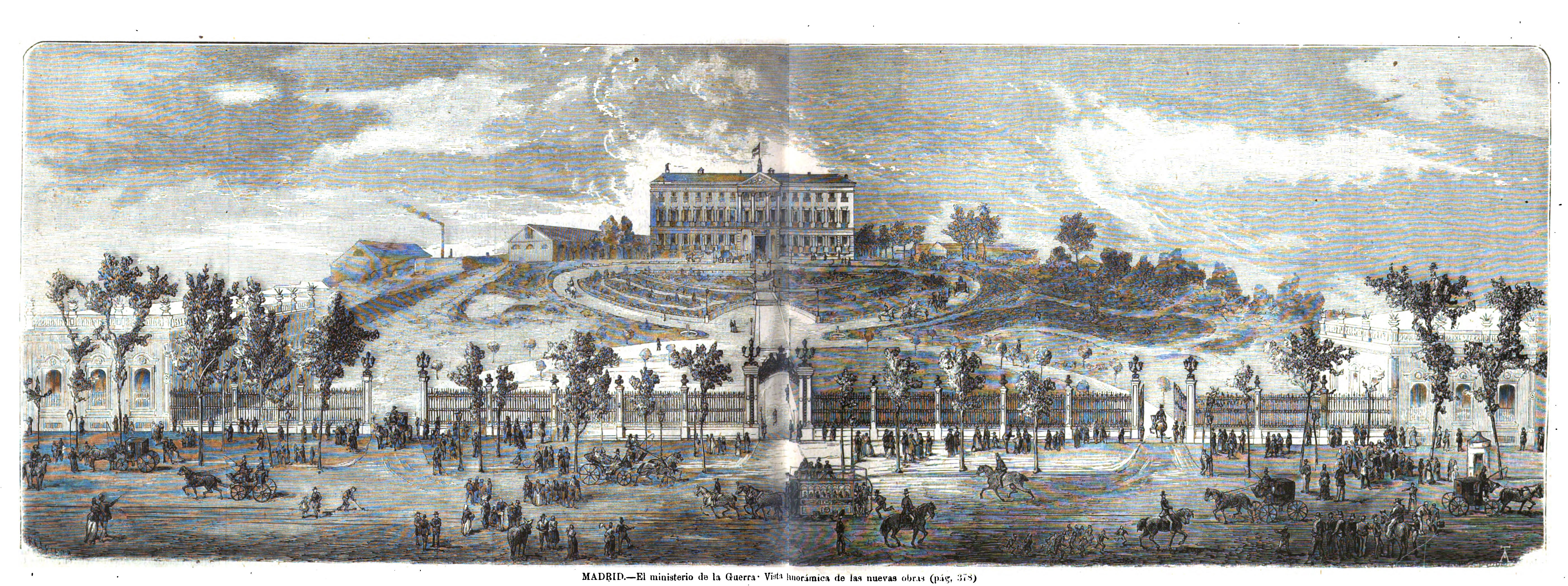 Madrid.—El Ministerio de la Guerra. Vista panorámica de las nuevas obras.